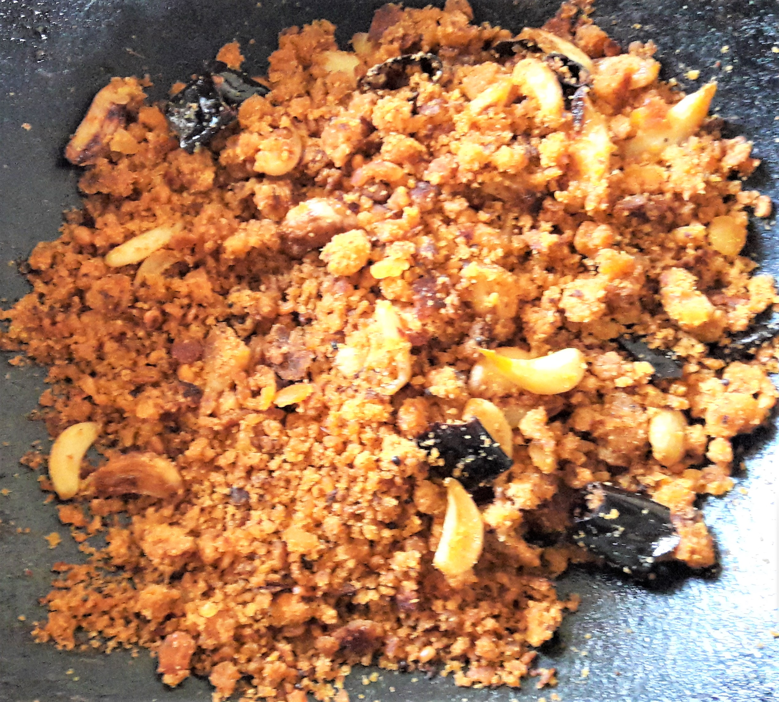 తెలగపిండి పోపు కూర